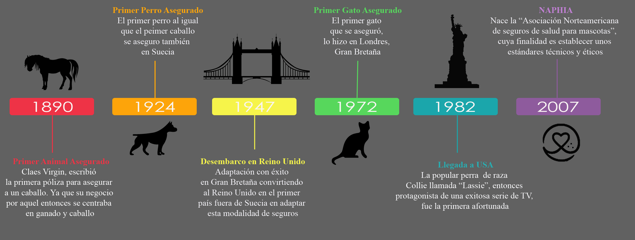 Linea temporal con informacion sobre los seguros veterinarios